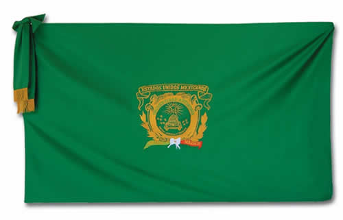 La bandera de la Universidad Autónoma del Estado de México